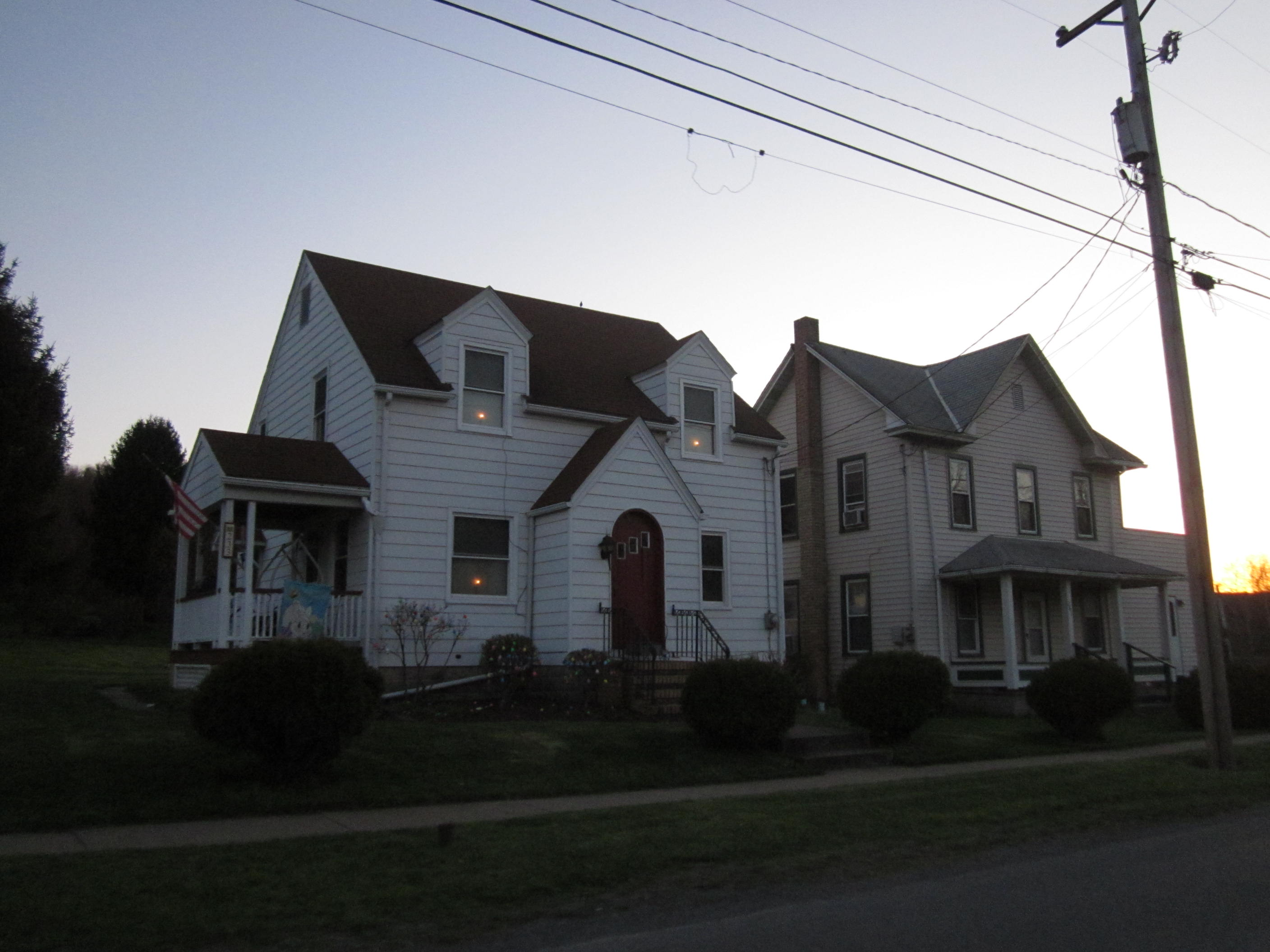 Brisbin, Pennsylvania